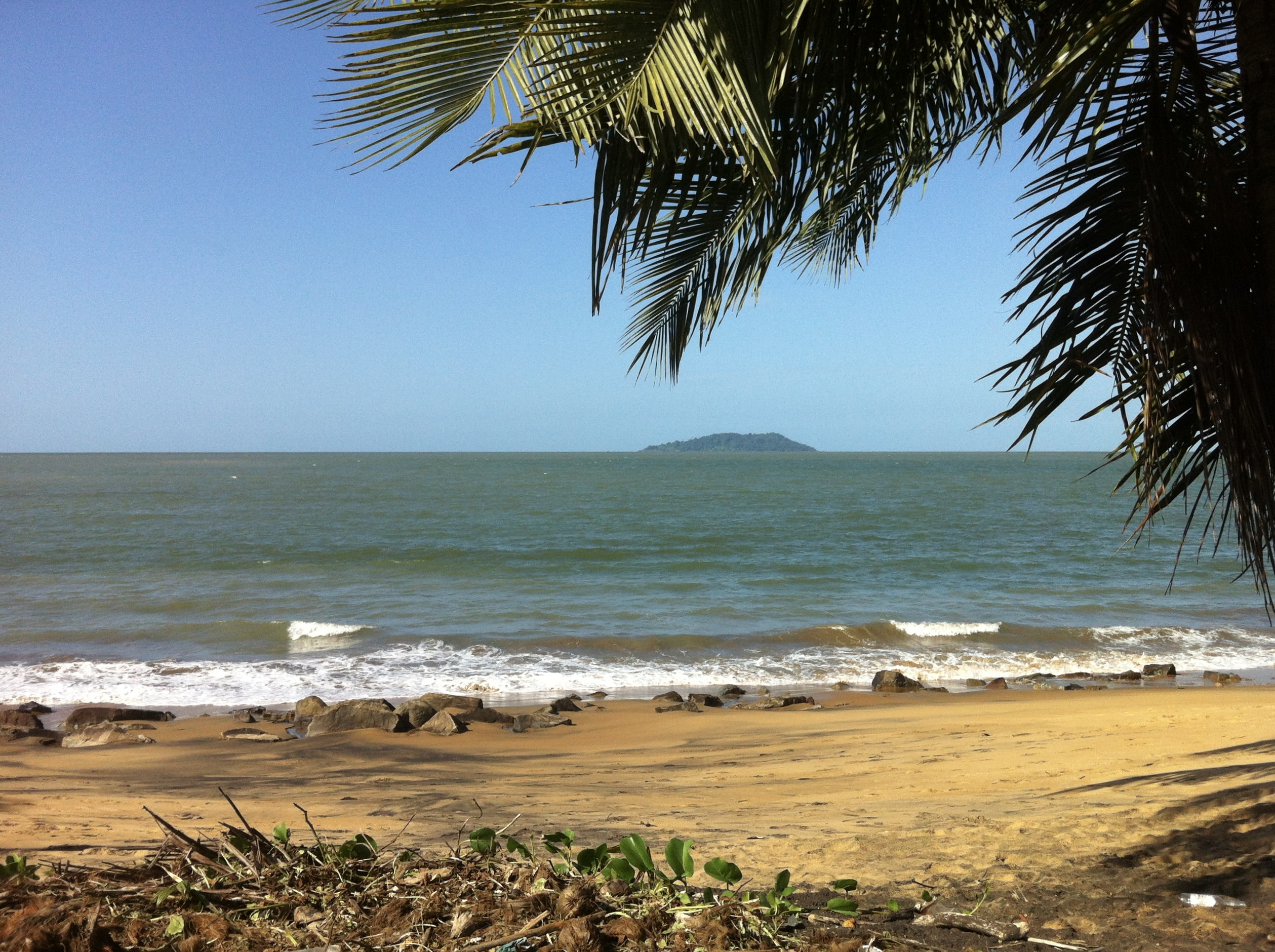 Plages de Rémire-Montjoly